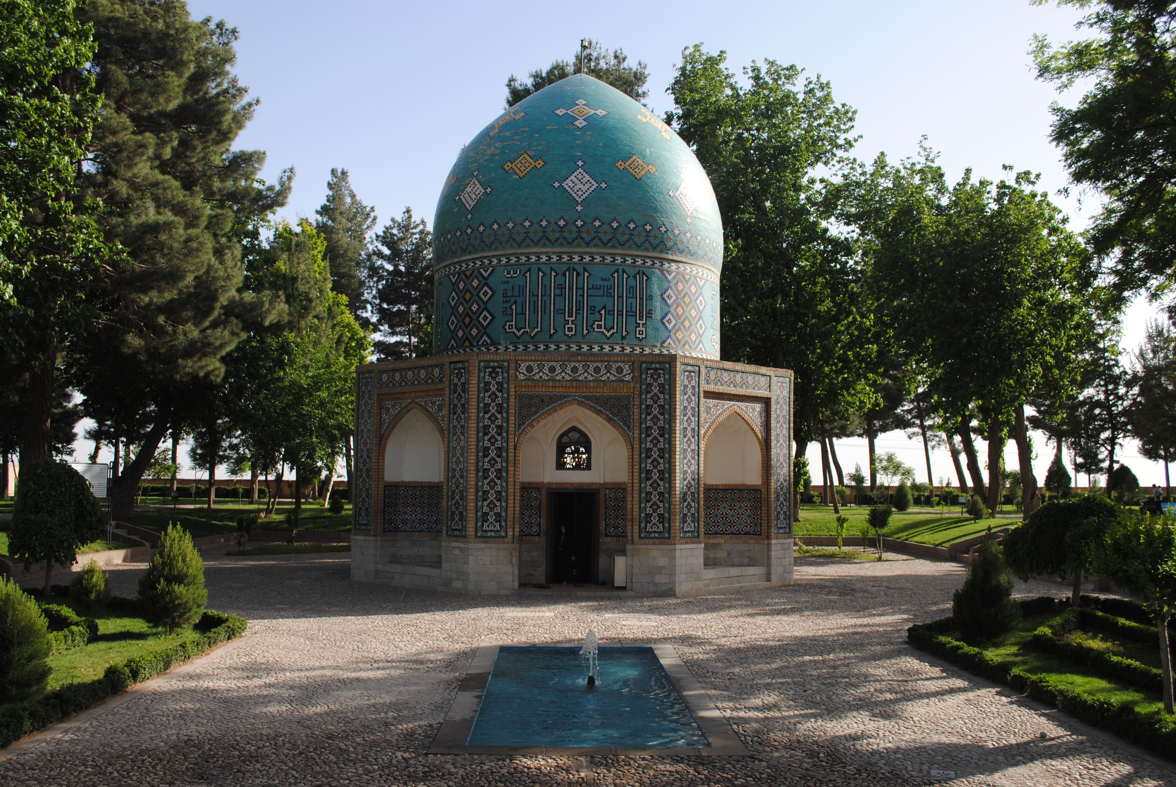 این بنا در شهر نیشابور،استان خراسان رضوی، واقع شده است